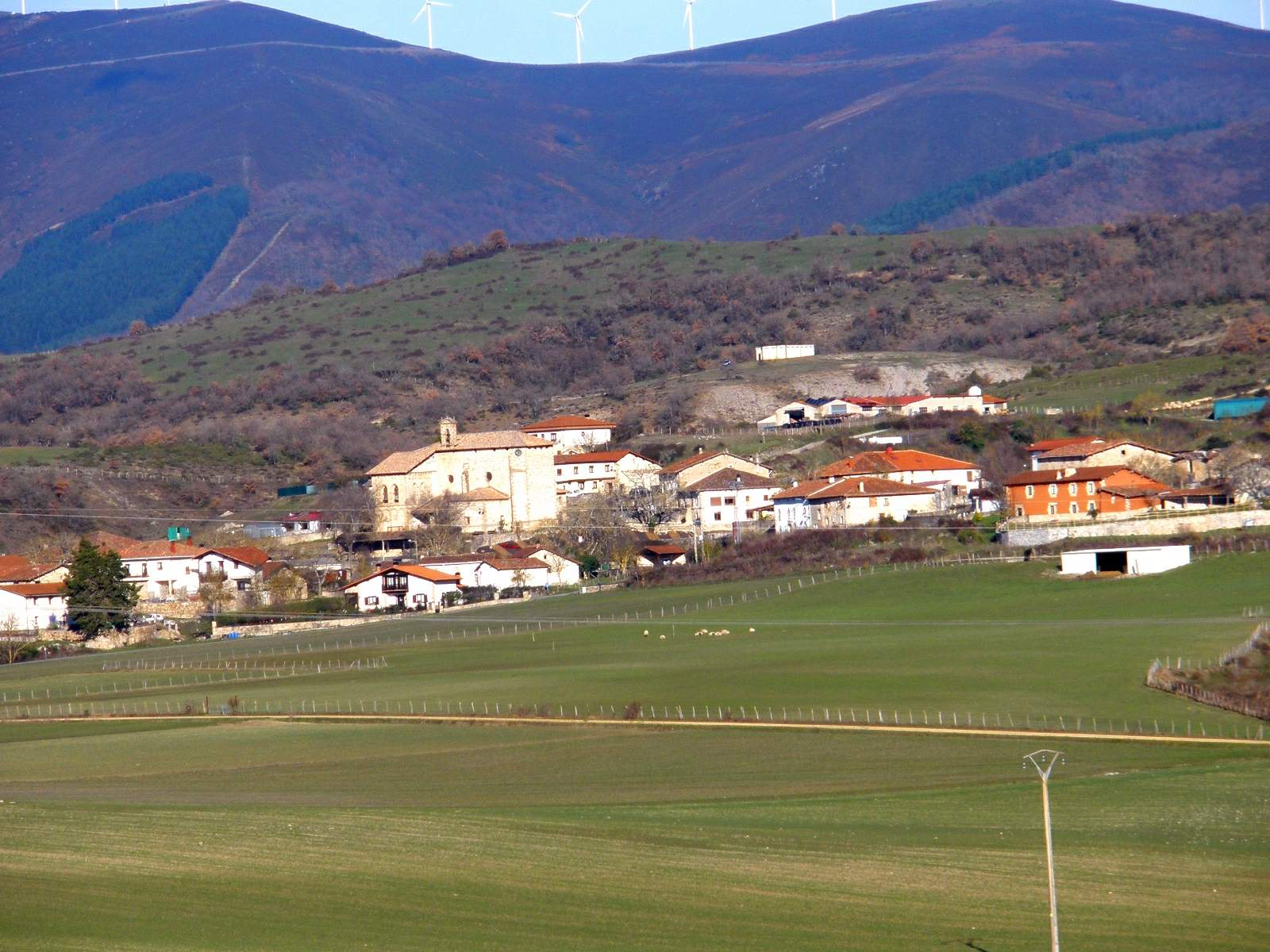 Vista de Arriola (Álava)